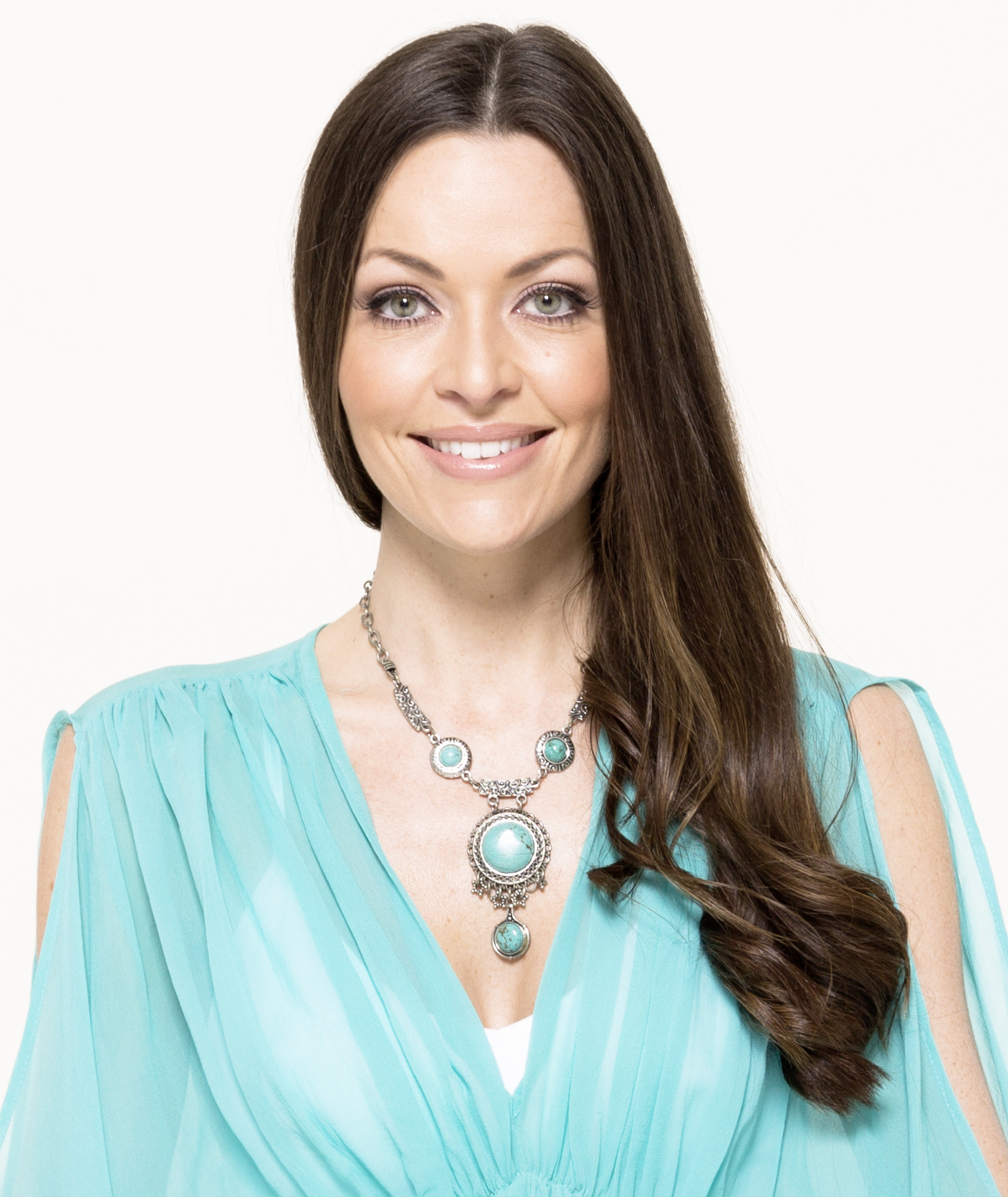 Kate Hall dänische Sängerin, Moderatorin und Vocalcoach